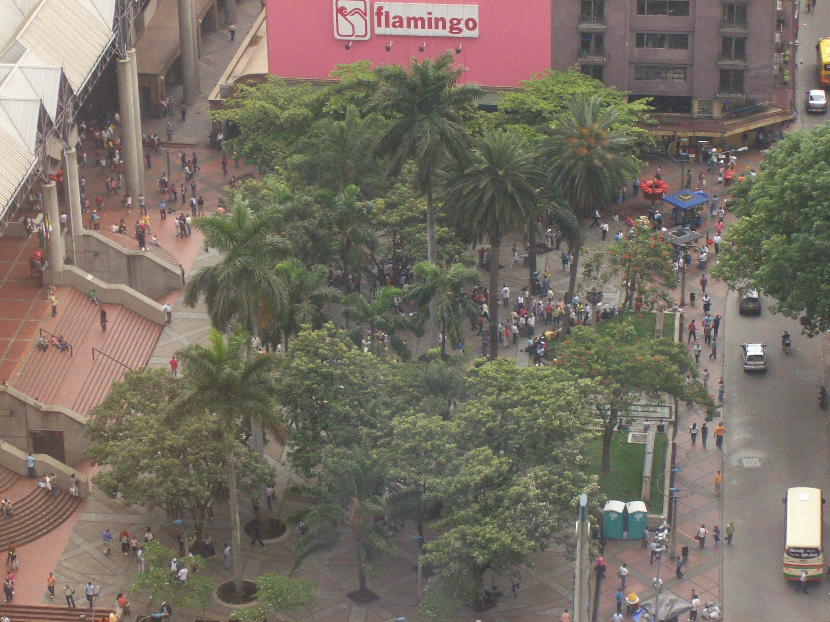 Vista del Parque de Berrío desde el Edificio del Café, Medellín.